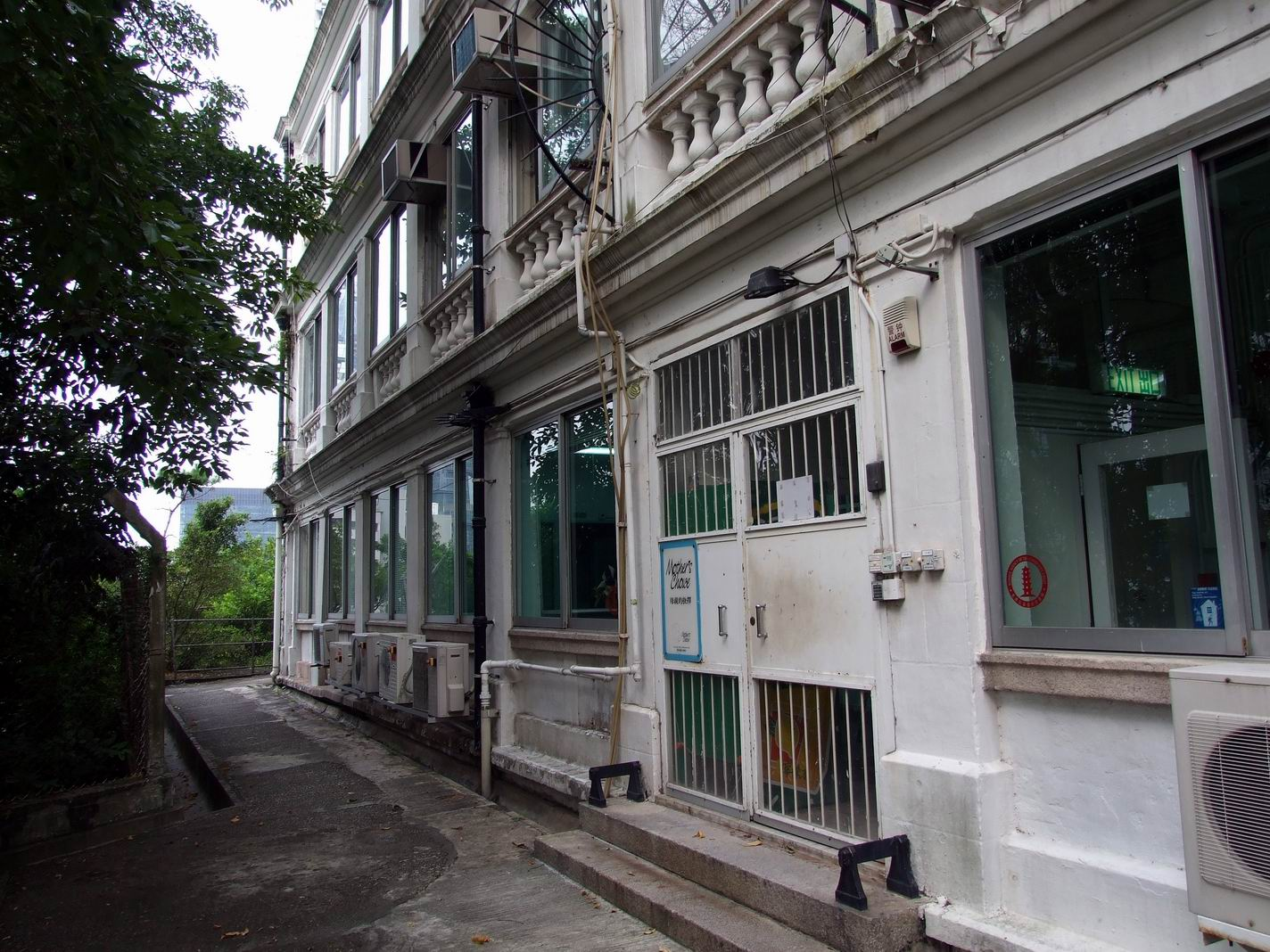 母親的抉擇中央行政大樓